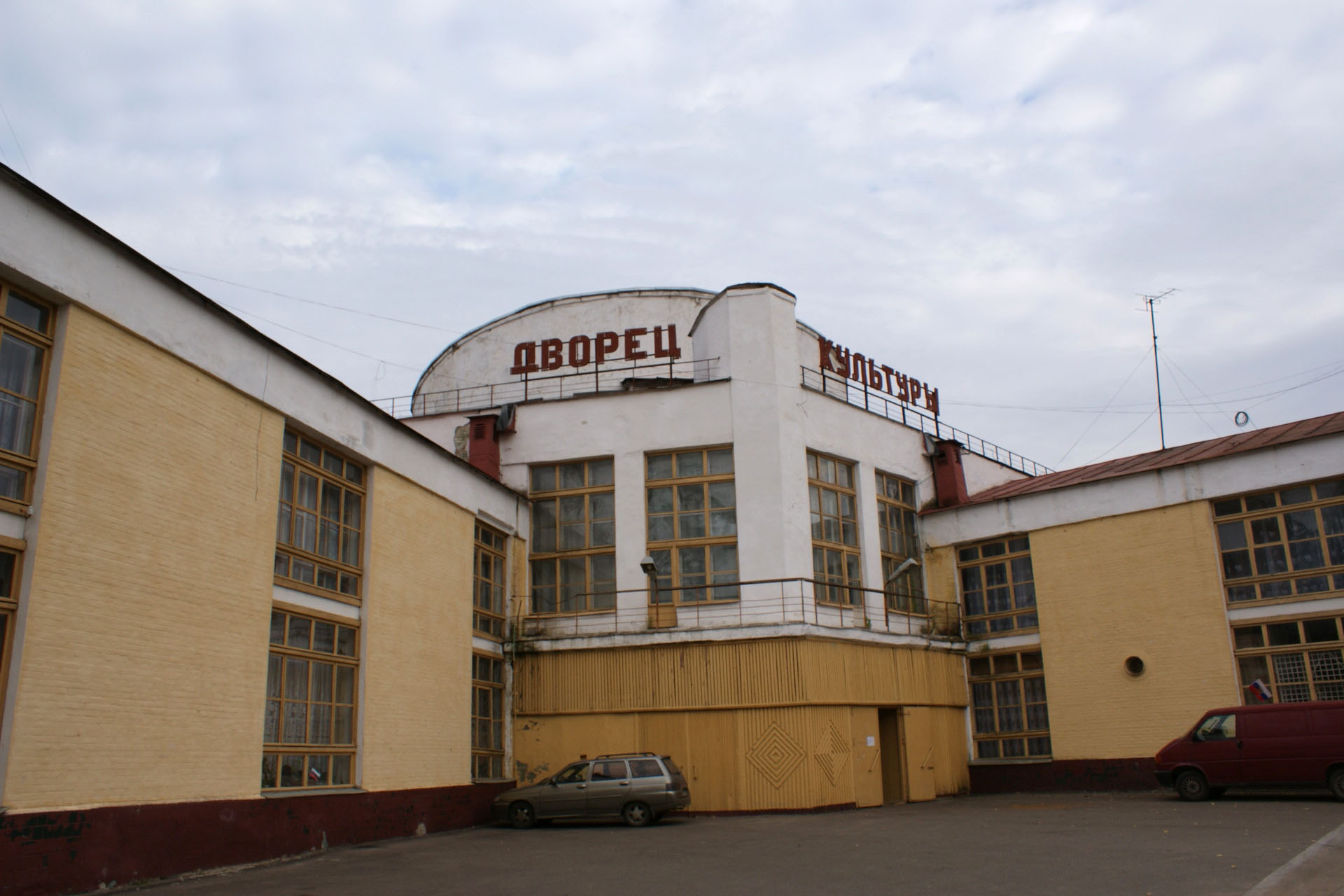 Дворец культуры фарфорового завода г. Ликино-Дулёво арх К. С. Мельников